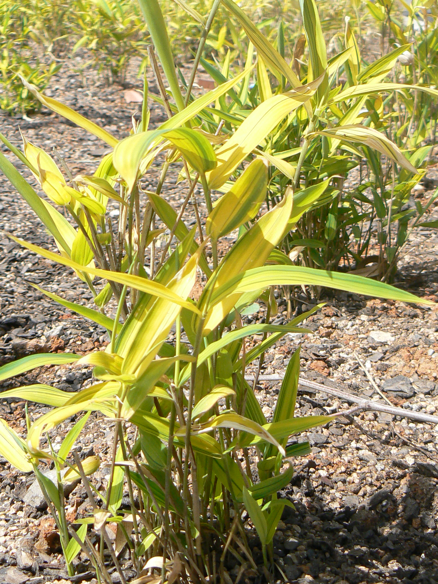 Description: Pleioblastus viridistriatus Source: self-made Date:20-05-2007 License: PD Location: Parc de Vallparadís, Terrassa (Catalonia).